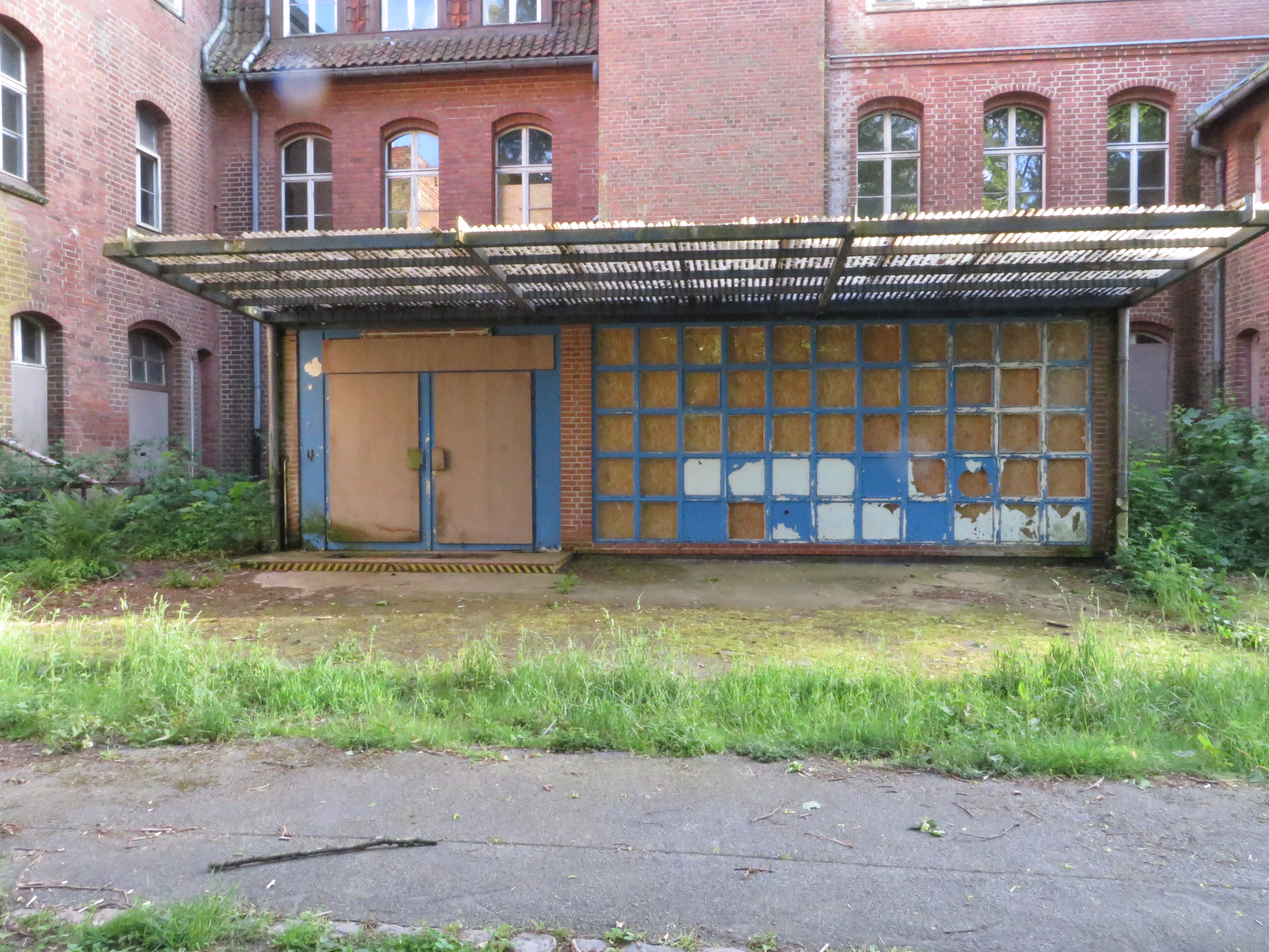 Vorburgbereich der Marine-Burg, Klinik-Ost, Eingang